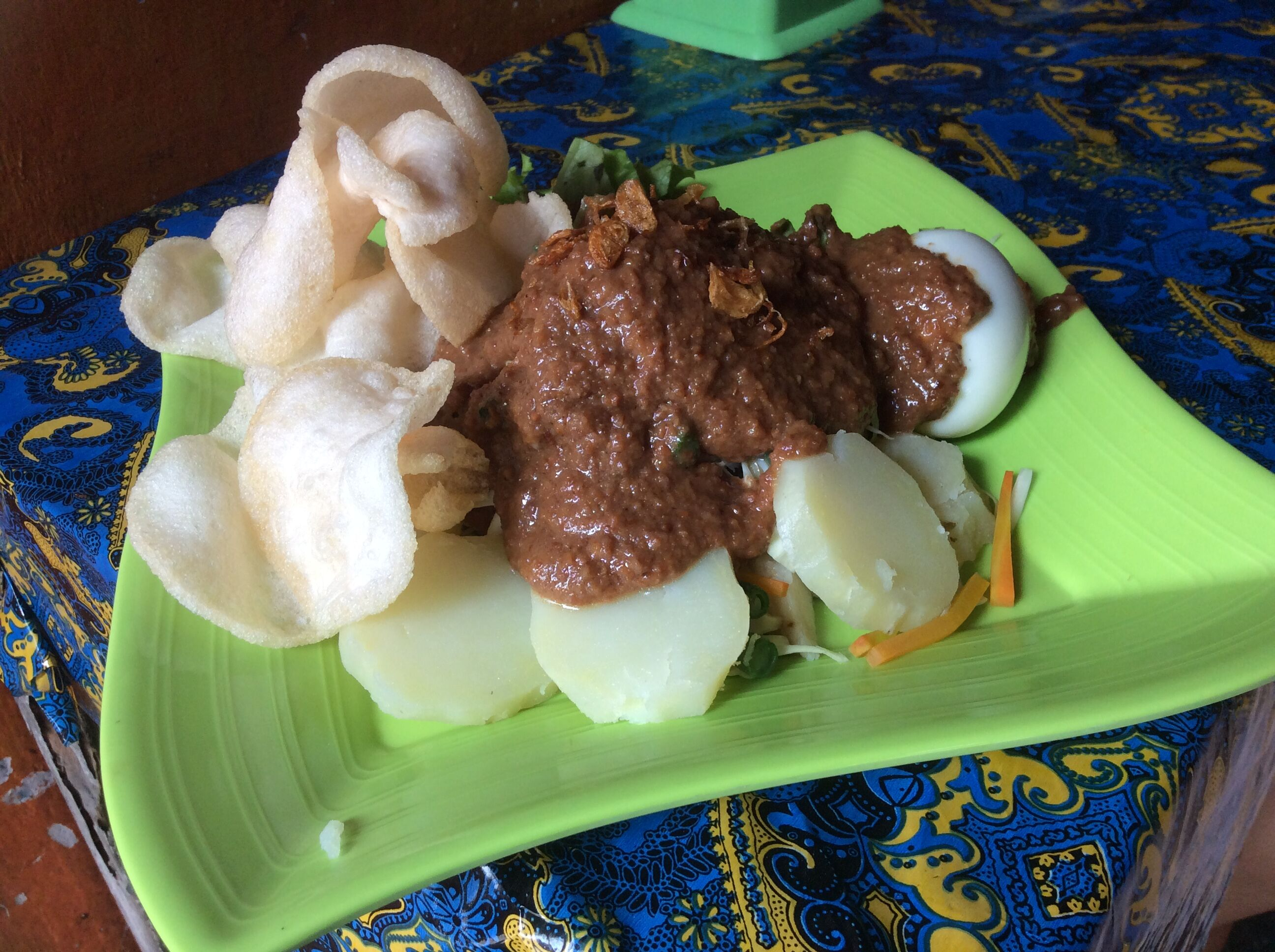 拍攝于日惹市